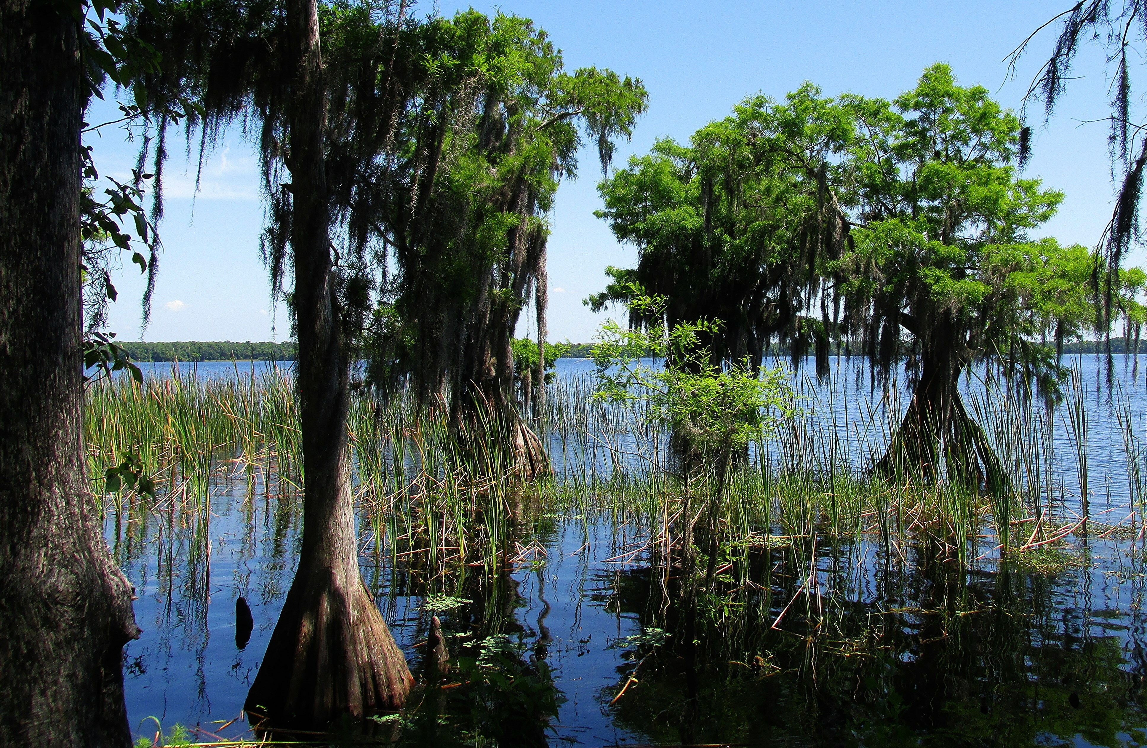 Lake Russell view